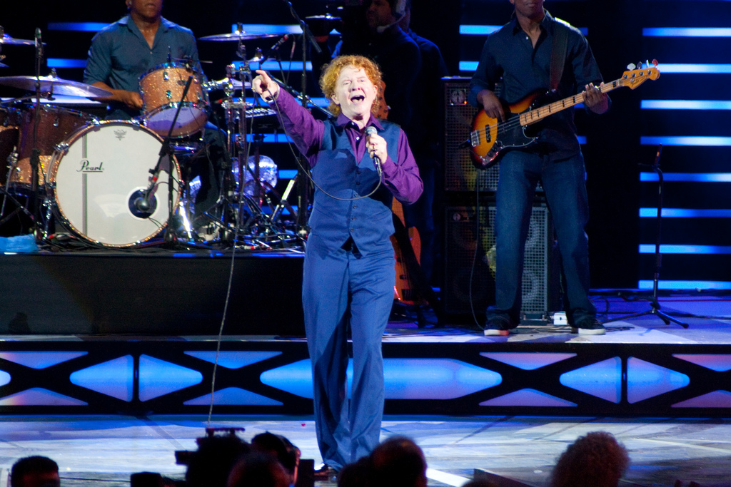 Simply Red en Viña del Mar, Chile.